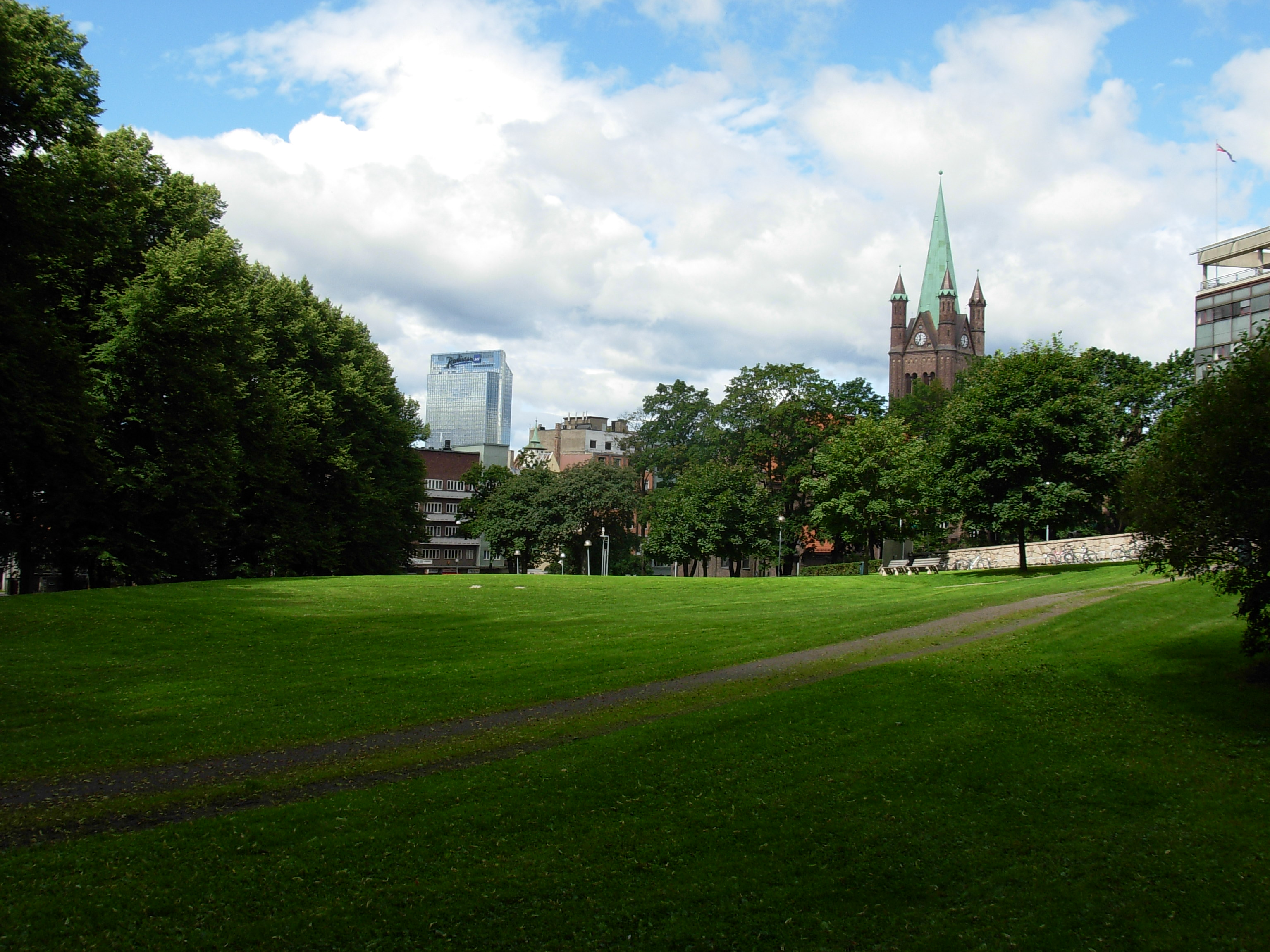 Grønlands park, Oslo, sett mot vest